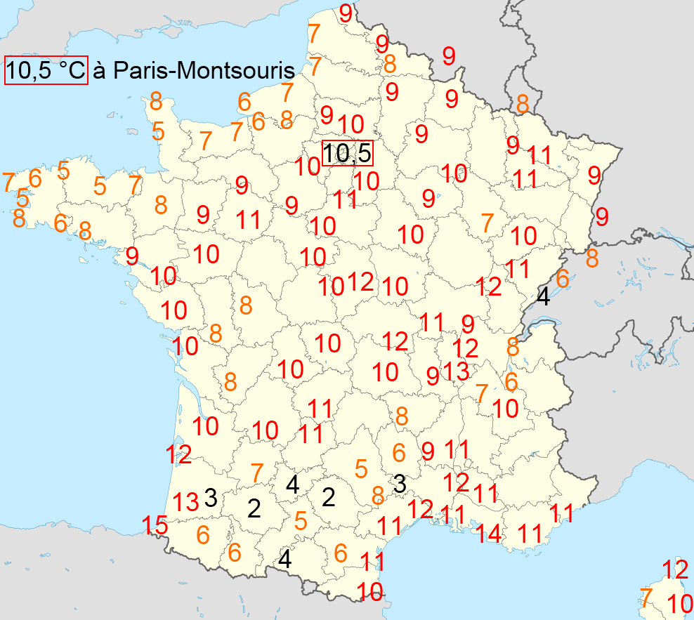 Température mini du 8 janvier 2011 en France.